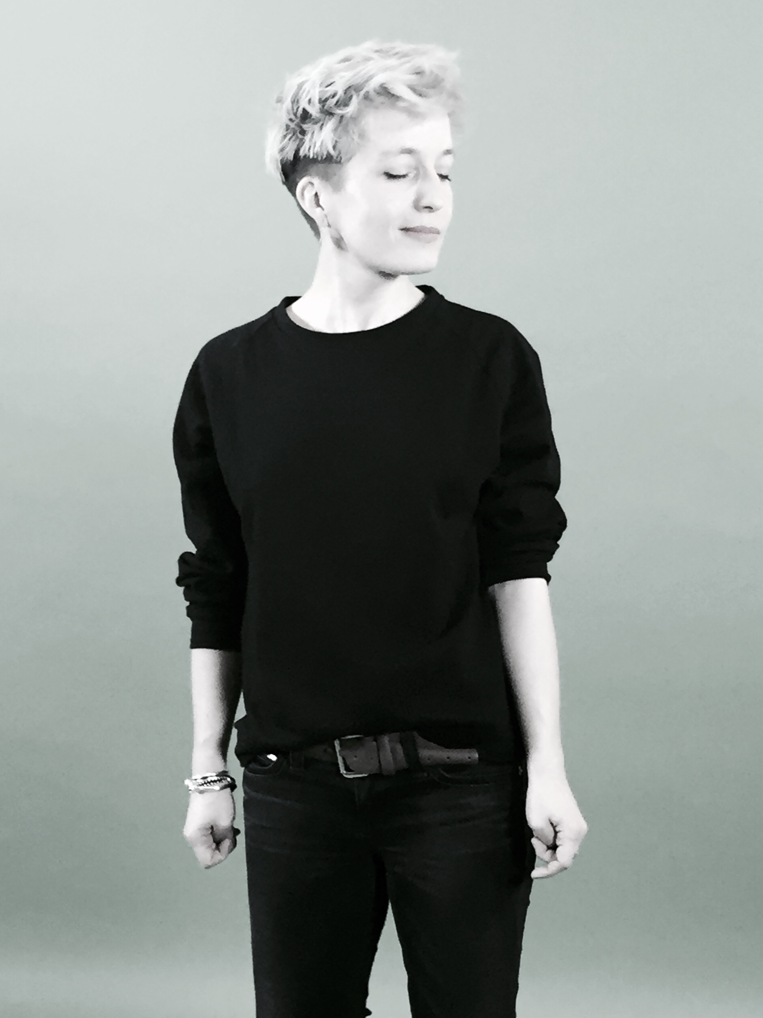 Photo de Jeanne Added